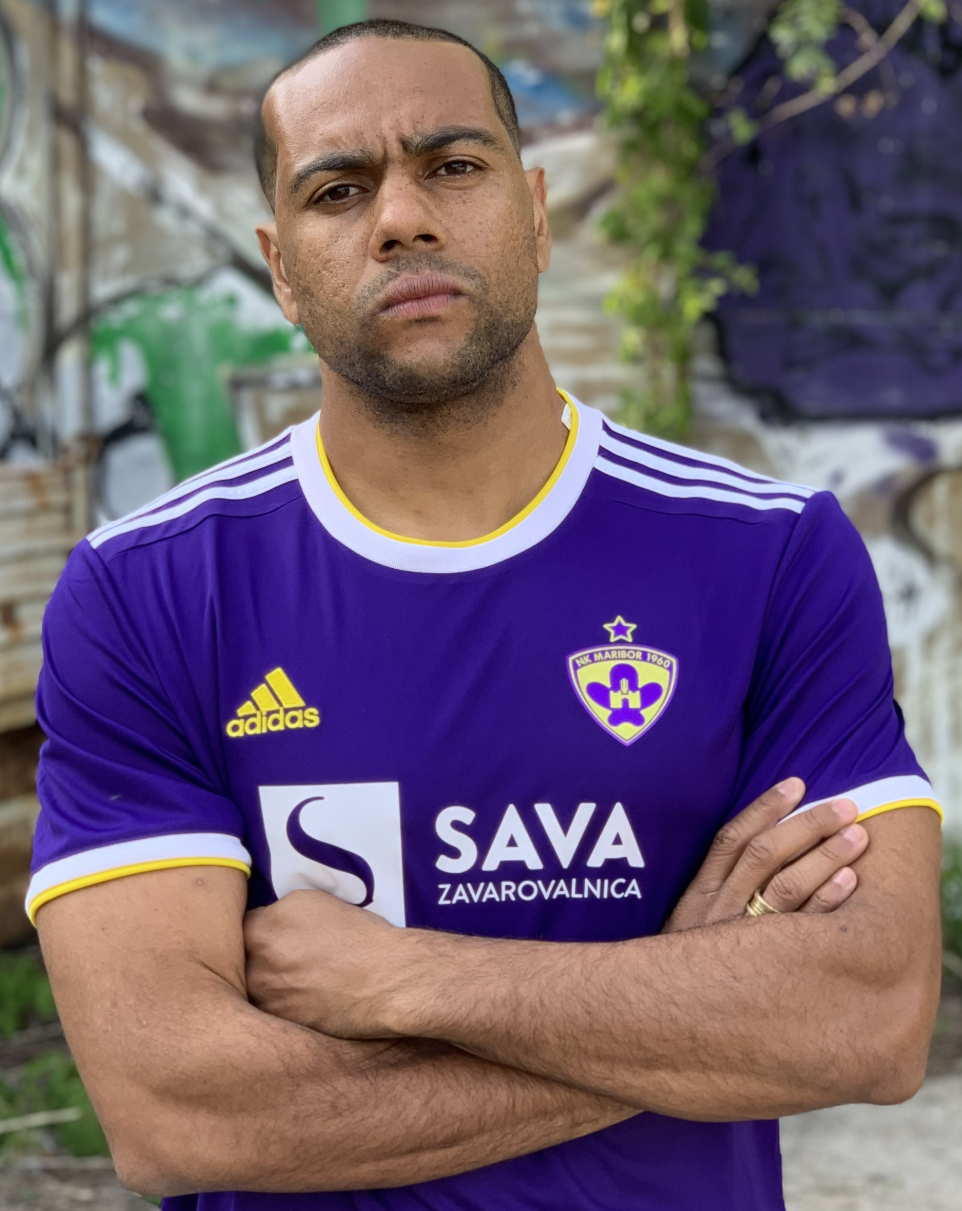 Marcos Tavares, Maribor, june 2019